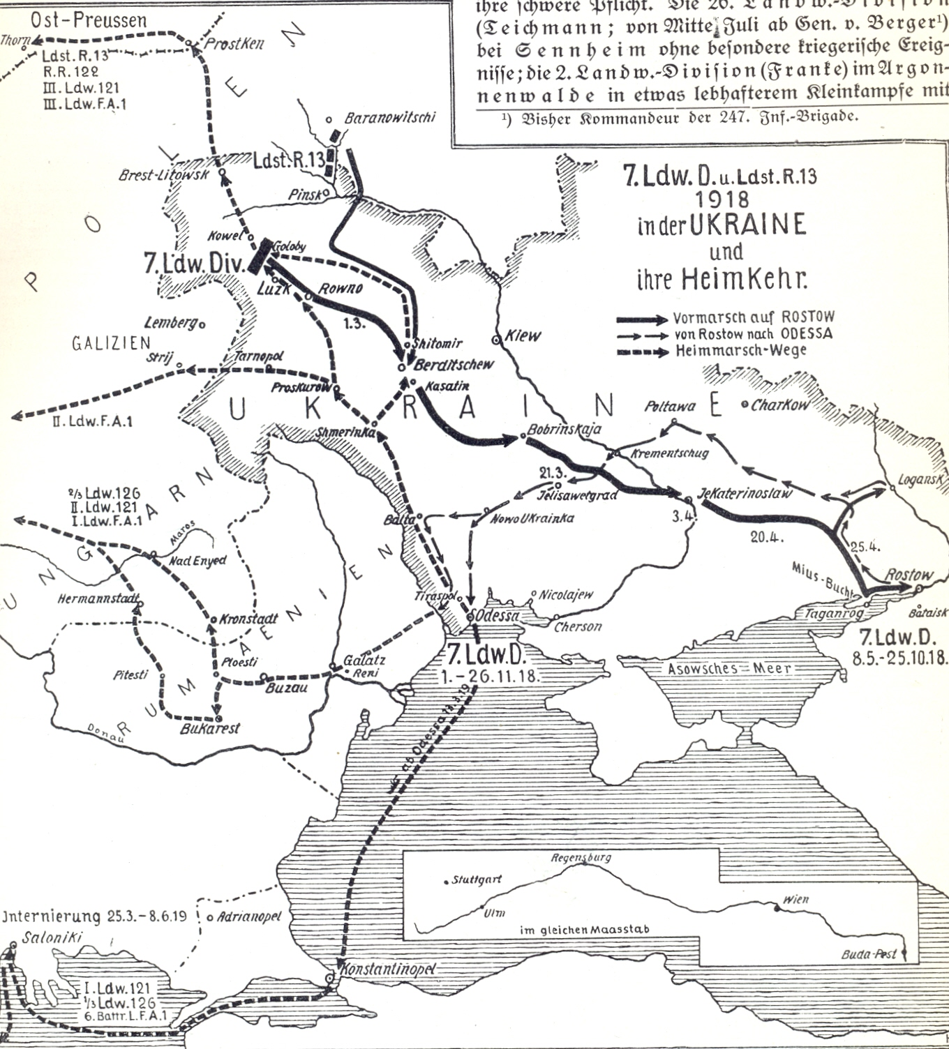 Karte: 7. L.D. und Ldst.-Regt. 13 in der Ukraine und ihre Heimkehr